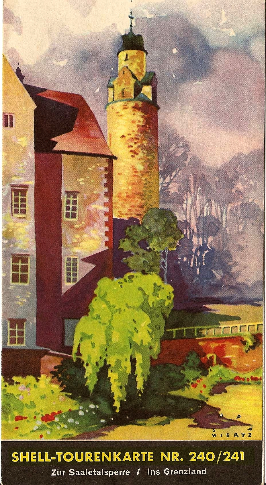 Umschlagbild für Blatt Nr. 240 "Zur Saaletalsperre / Ins Grenzland" für die Shell-Tourenkarte. Veröffentlicht durch Rhenania-OSSAG MineralölwerkeAktiengesellschaft.